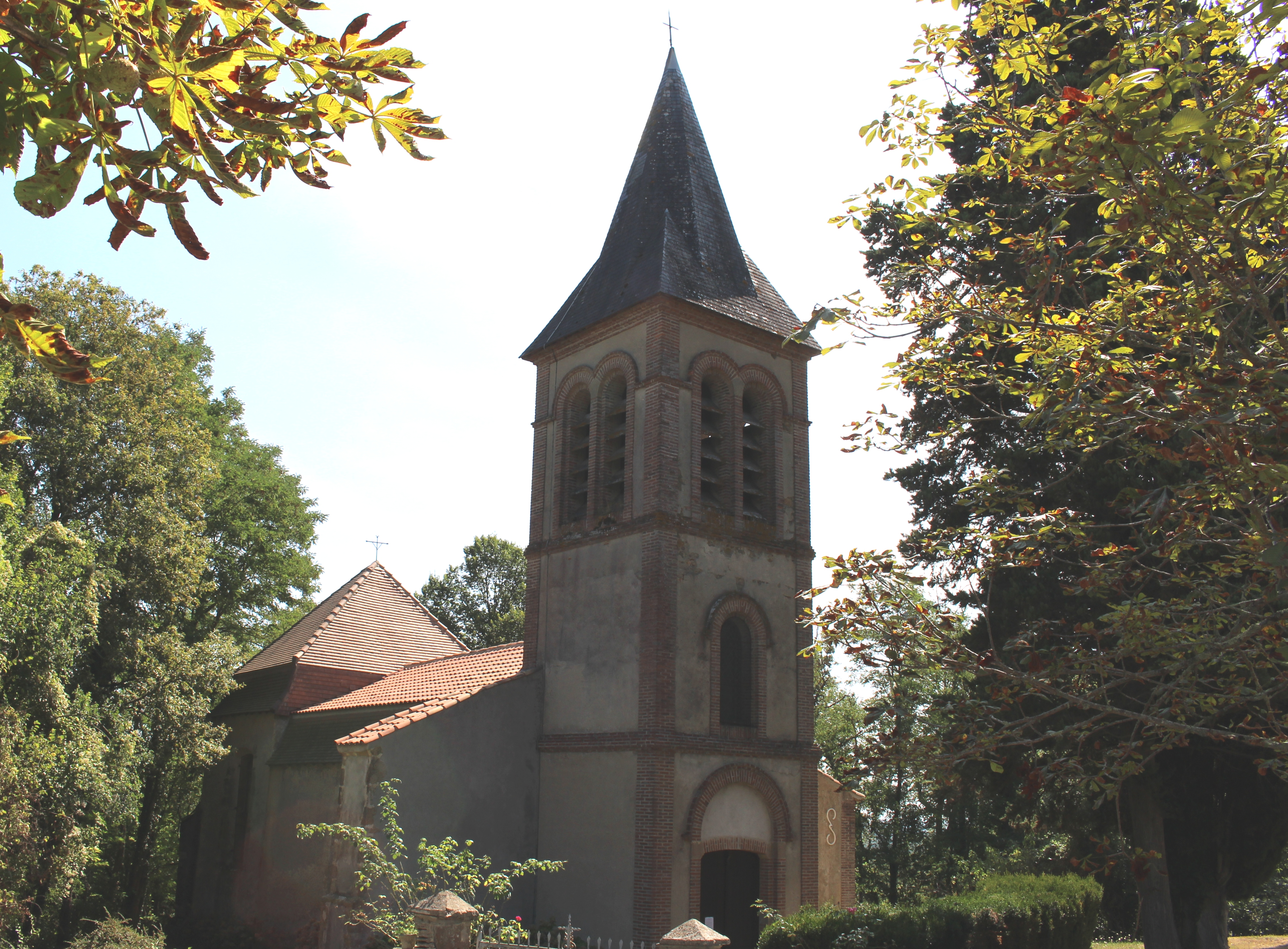 Église Saint-André de Soublecause (Hautes-Pyrénées)